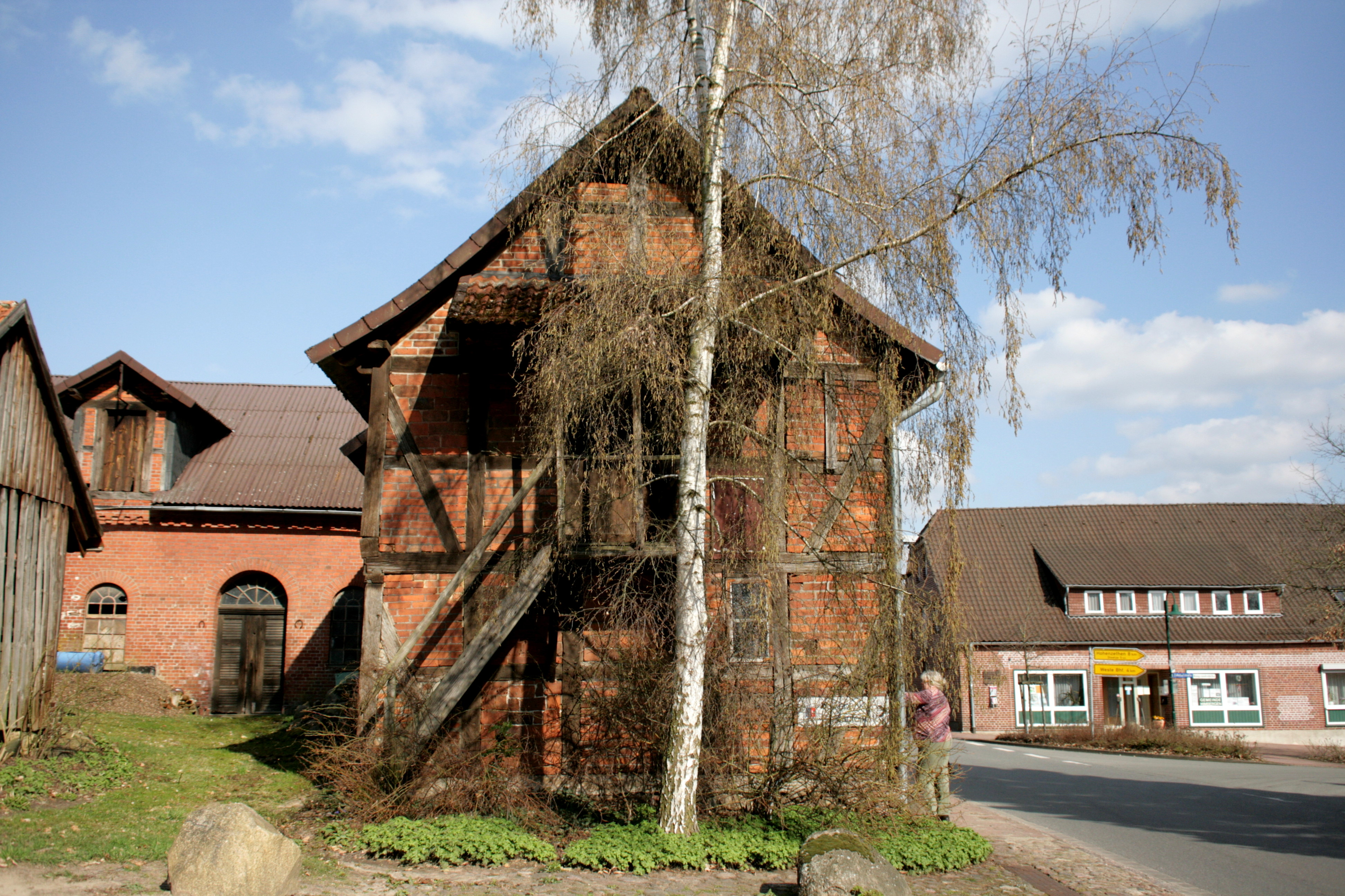 Treppenspeicher, Göhrdestraße 7 in Himbergen